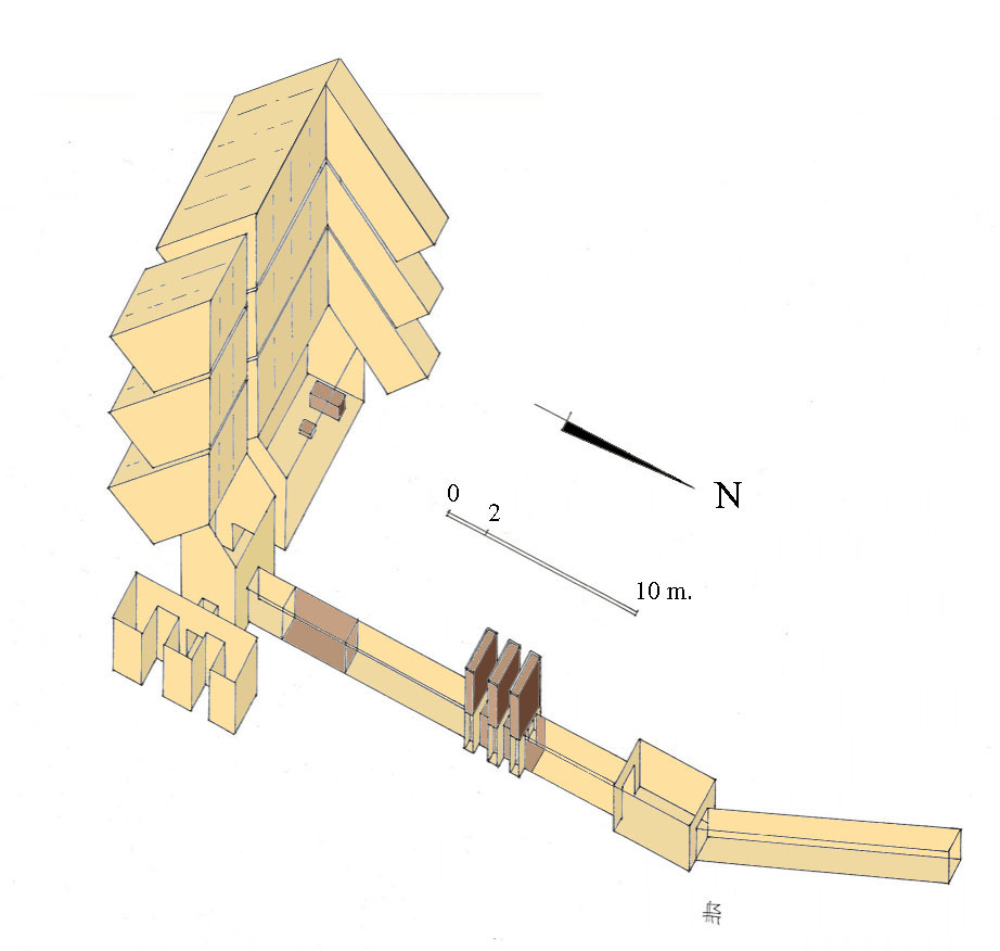 Vue axonométrique des appartements funéraires de Djedkarê Isési à saqqarah